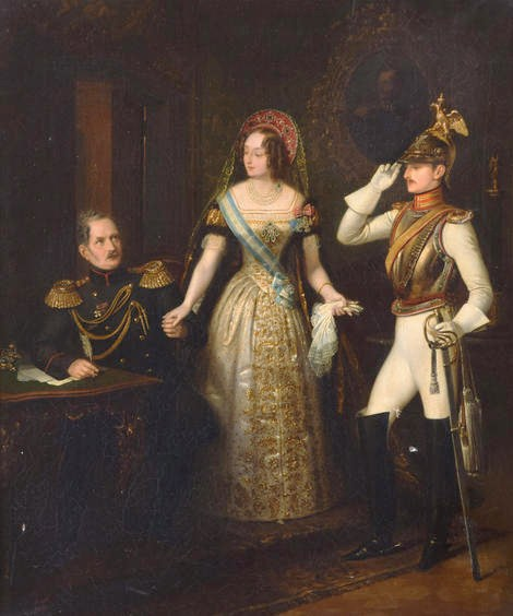 Граф Алексей Фёдорович Орлов с женой Ольгой Александровной и сыном Николаем.